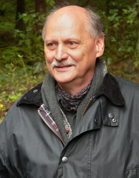 Hans-Georg Stephan, Führung im Solling